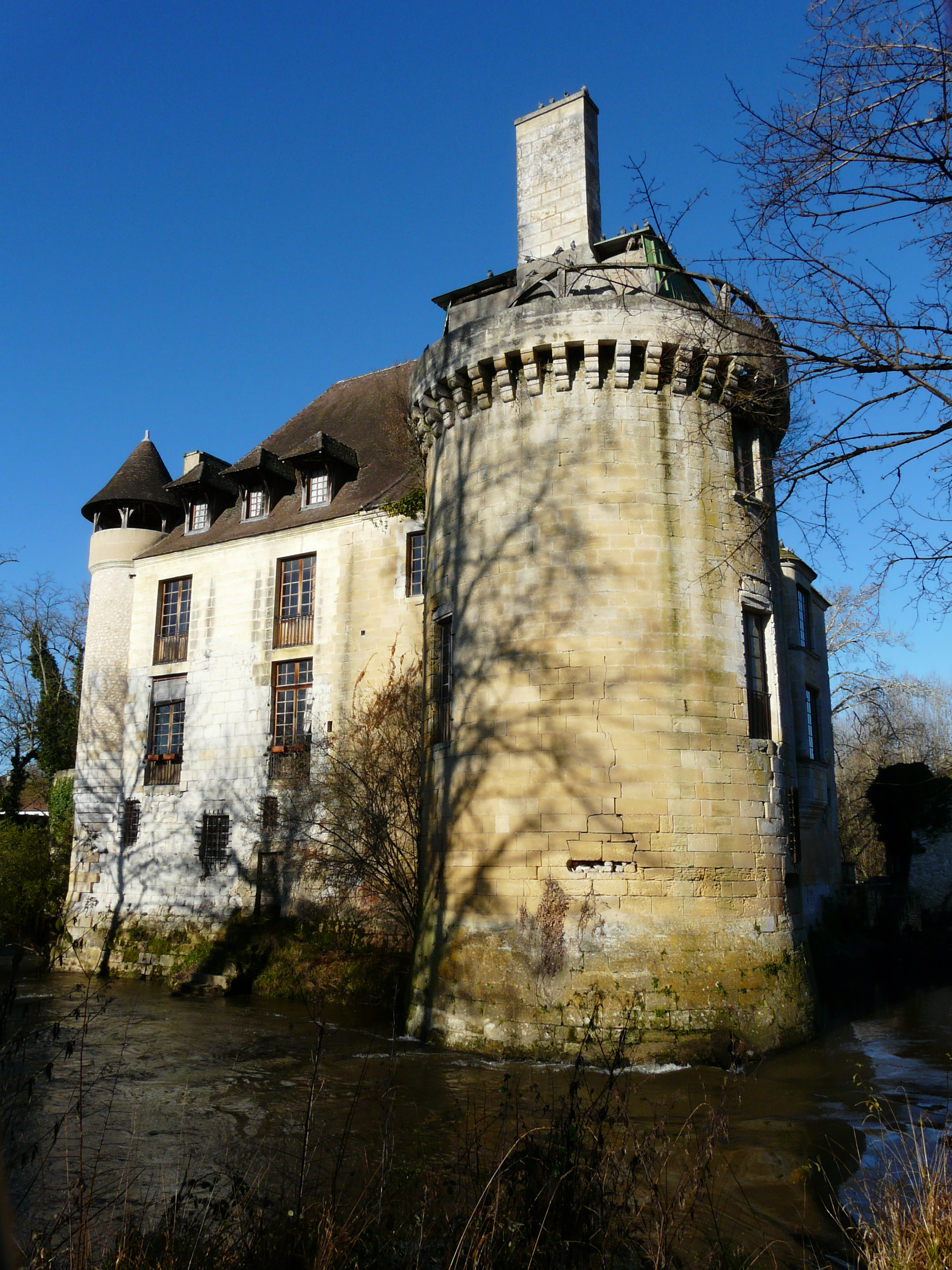 La tour orientale du château de Rognac, contourné par un bras de l'Isle, Bassillac, Dordogne, France